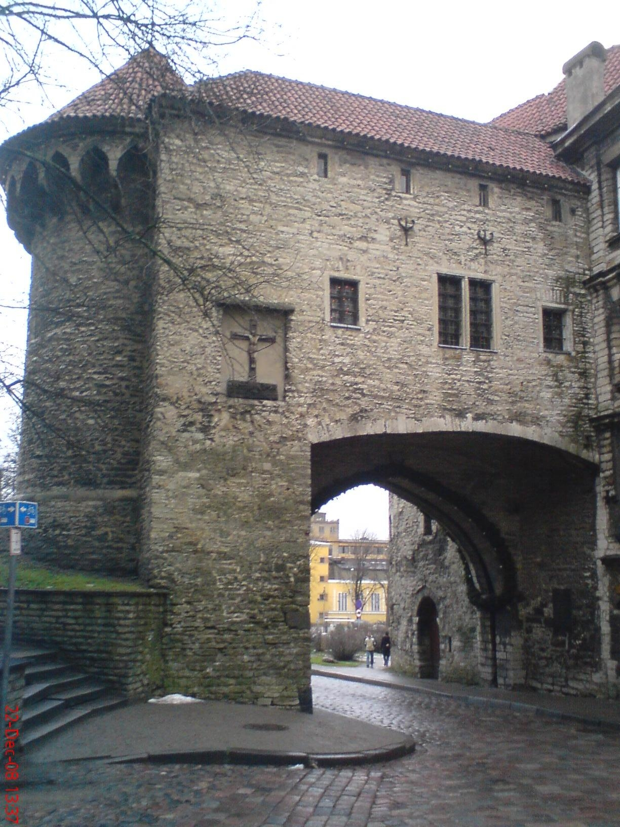 Tallinna linnamüüri Suur Rannavärav ning selle vasakpoolne kaitsetorn, Pikalt tänavalt vaadates